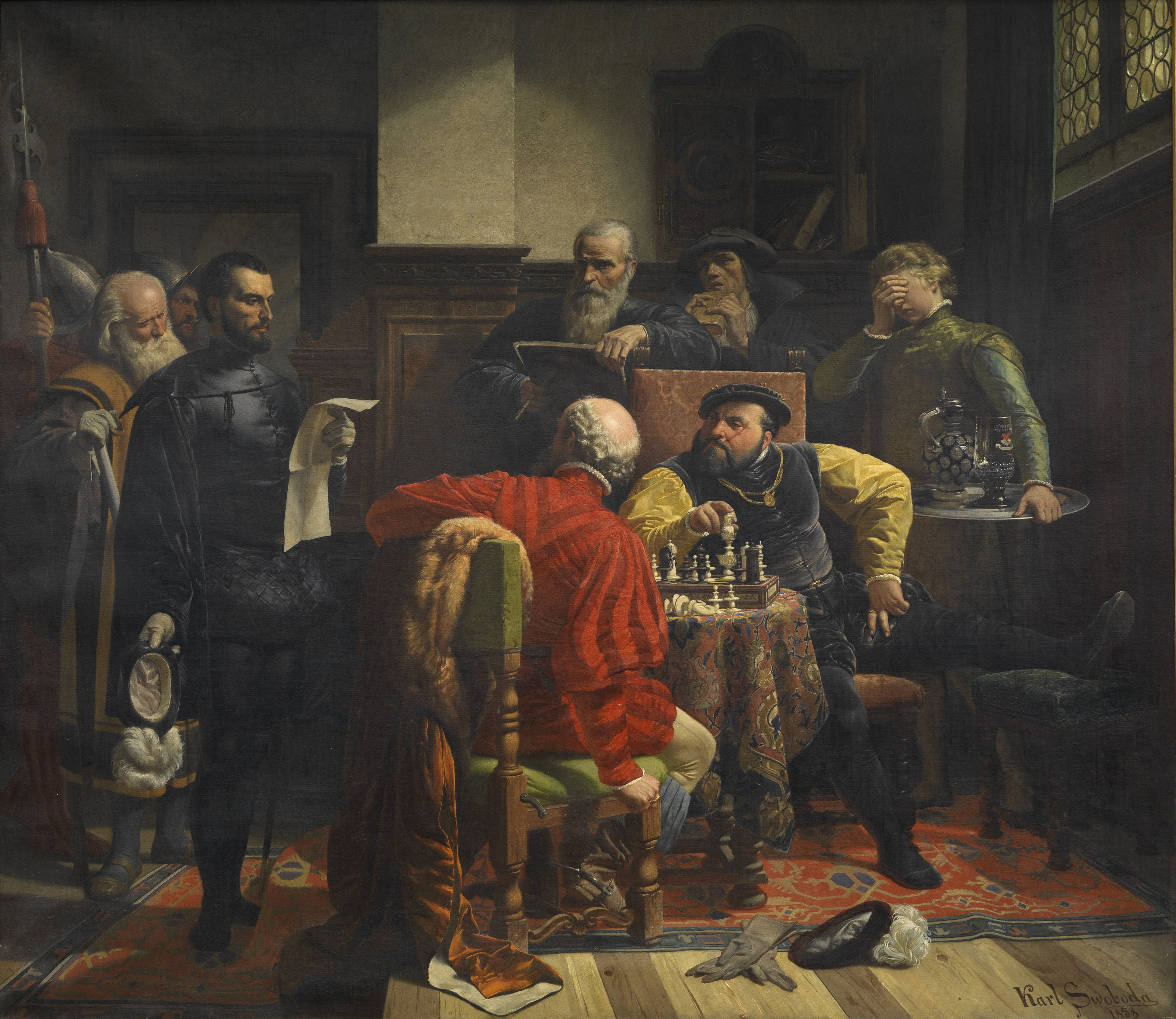 Verkündigung des Todesurteils an den Kurfürsten Johann Friedrich von Sachsen (1503-1554) im Jahre 1547, der Schachpartner ist Ernst III. (Braunschweig-Grubenhagen)